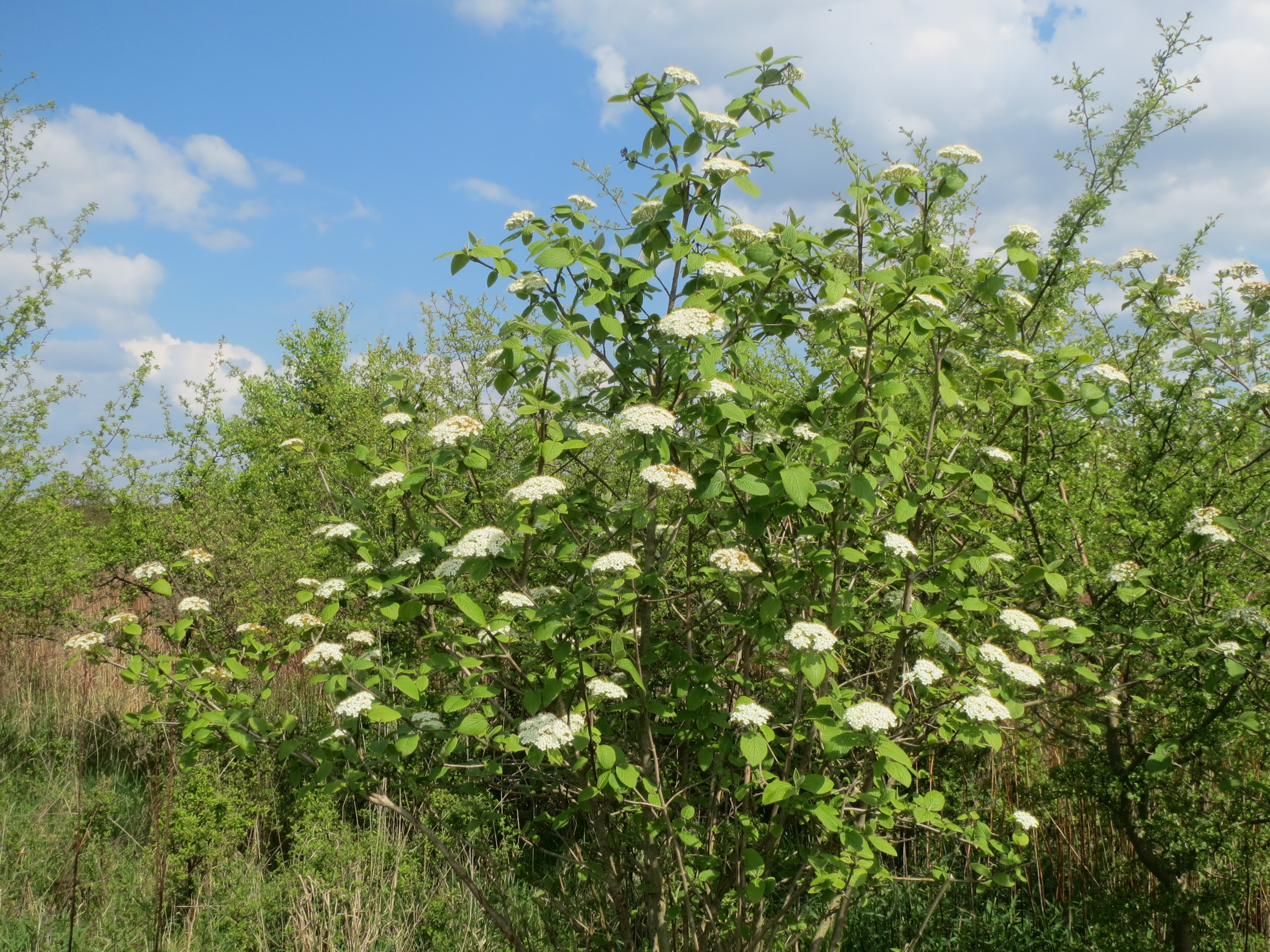 Wolliger Schneeball (Viburnum lantana) im Hockenheimer Rheinbogen